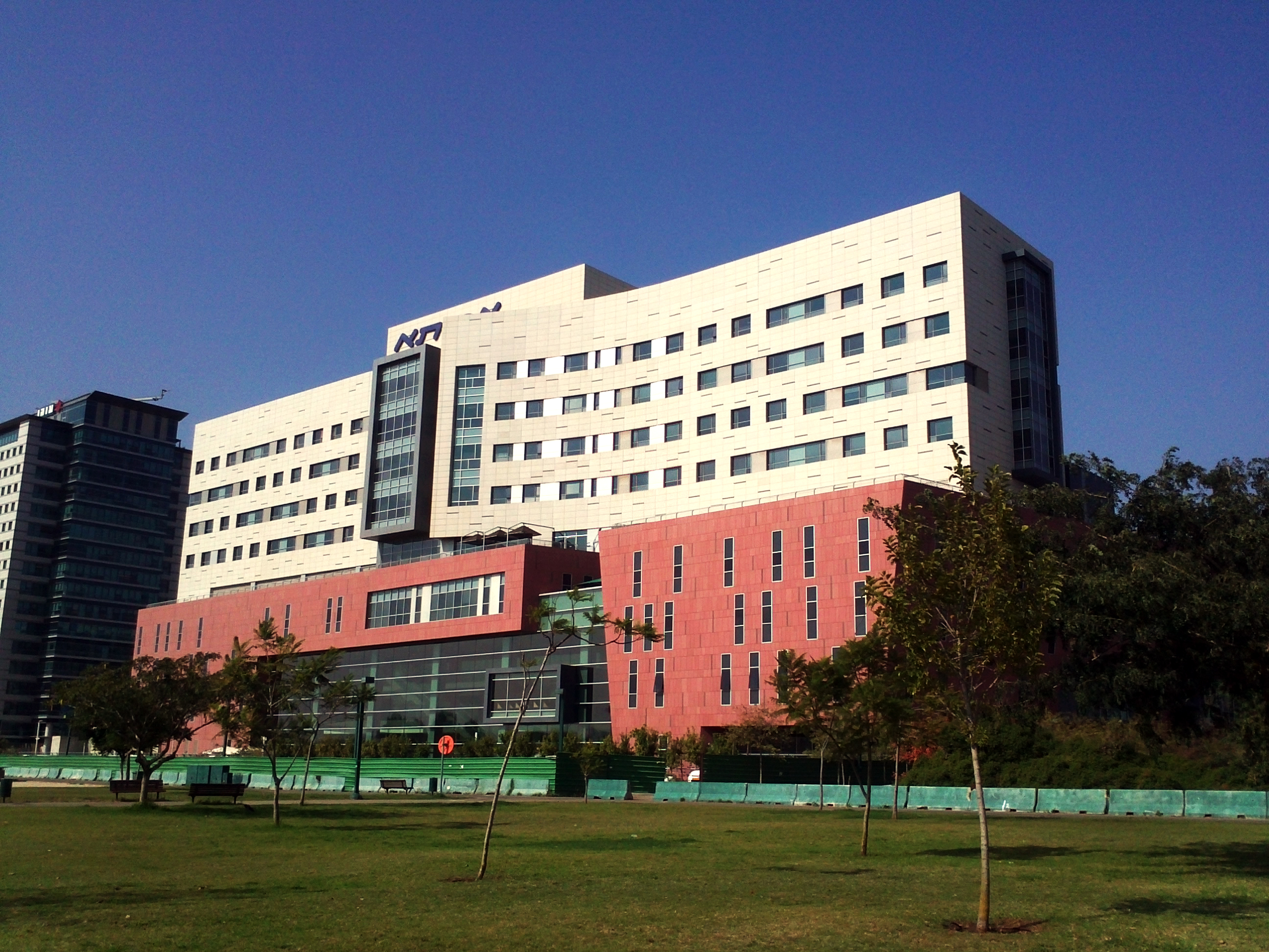 Больница Ассута в Тель-Авиве